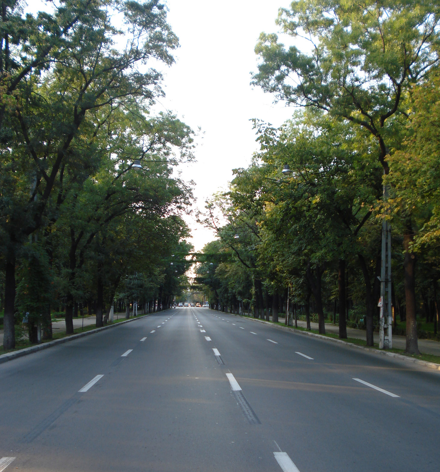 Şoseaua Kiseleff, Bucureşti